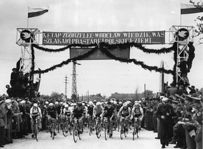 VIII. Friedensfahrt, Grenzüberfahrt Zentralbild CAF-V So-Ho 10.6.1955 - Die VIII. Internationale Friedensfahrt 1955 Prag-Berlin-Warschau. Am 14. Mai 1955 kamen die Friedensfahrer zum ersten Mal auf polnisches Gebiet. UBz: Die 10. Etappe Zgorzelec-Wroclaw. Start in Zgorzelec. Die Inschrift auf dem Spruchband lautet: "Die 10. Etappe Zgorzelec-Wroclaw führt Euch durch die alten polnischen Gebiete."